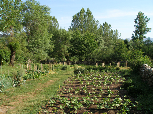 Huerta del CV Puente del Perdón